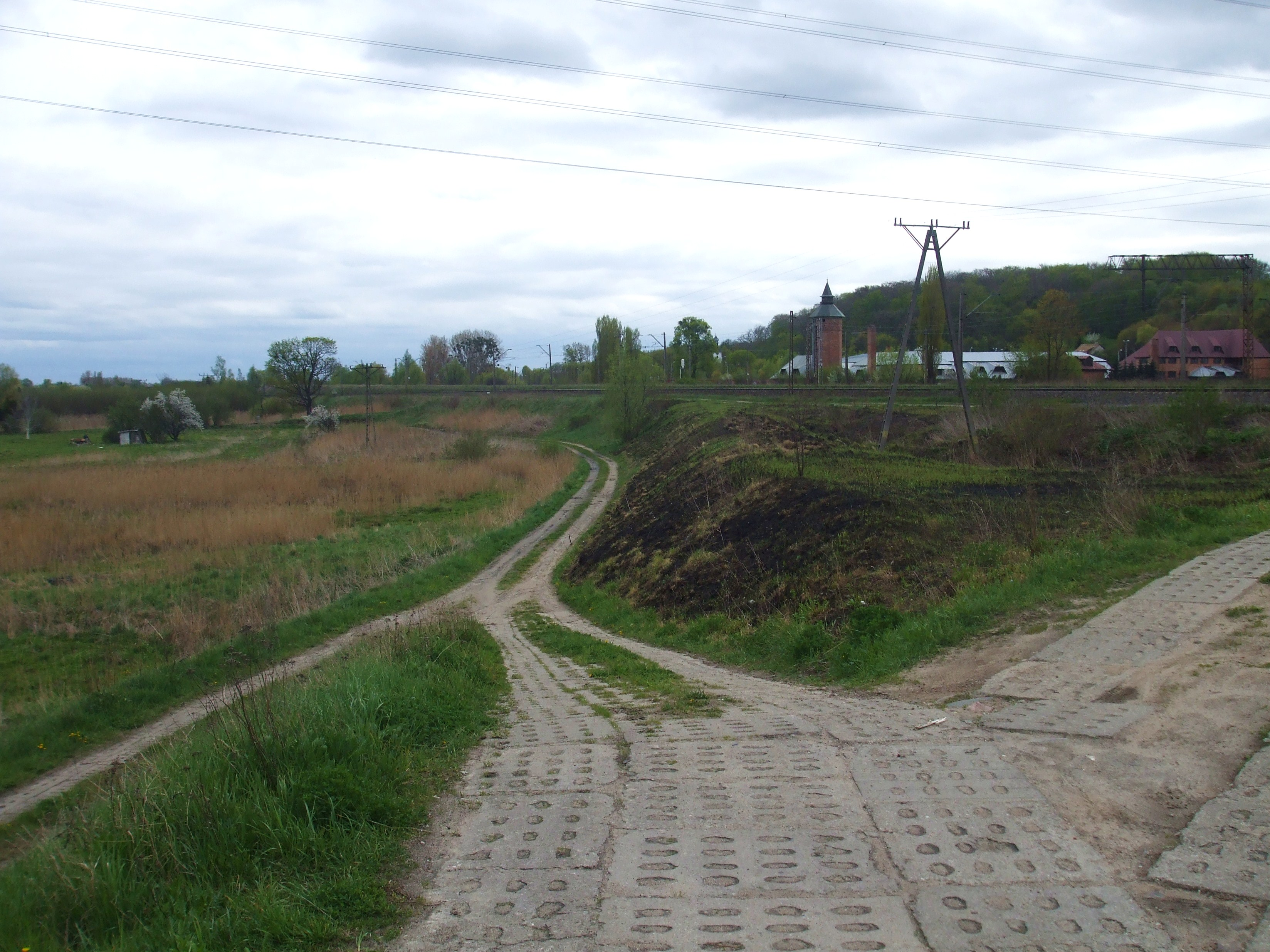 Gdańsk Orunia.